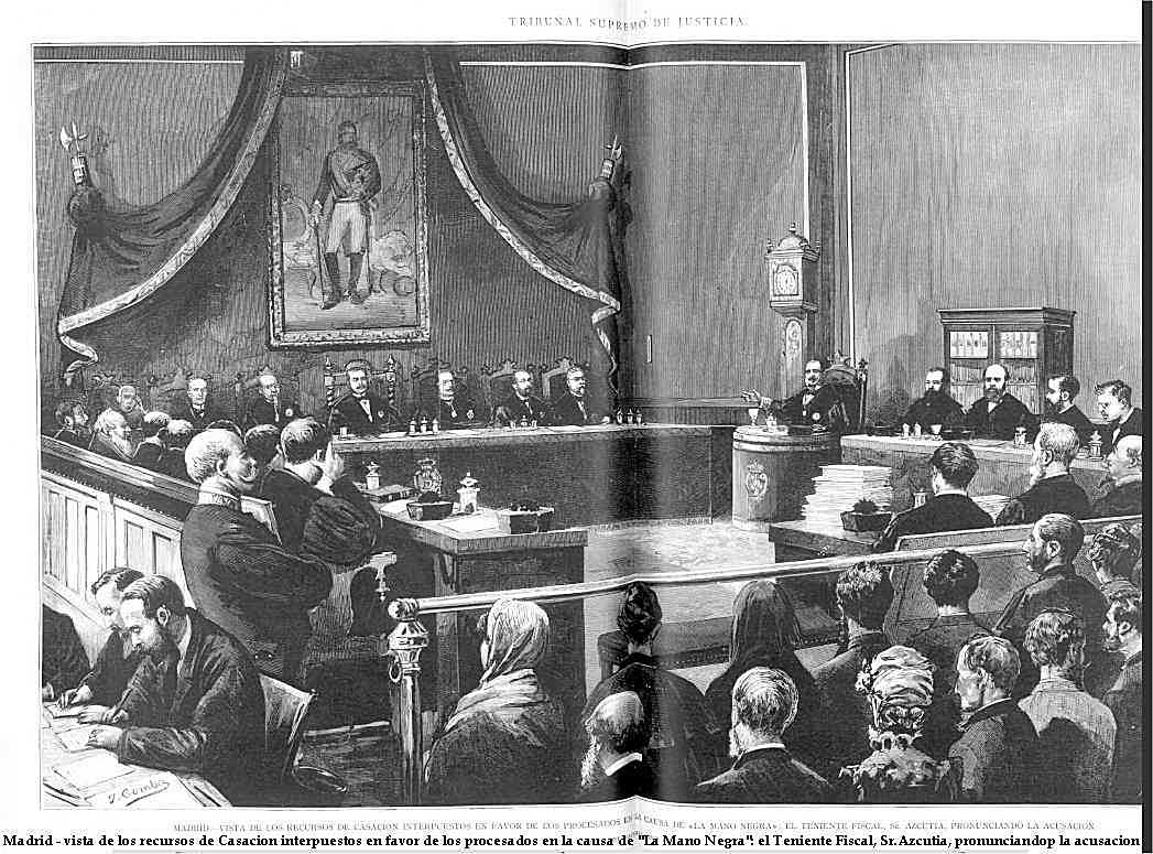 Madrid, sentenza del 22.3.1884 della Cassazione nel processo per l'assassinio di Bartolomé Gago y Campos detto "el Blanco de Benaocaz" altrimenti noto come processo della "Mano Negra" - pubblico ministero: Manuel Lopez de Azcutia - incisione di Juan Comba